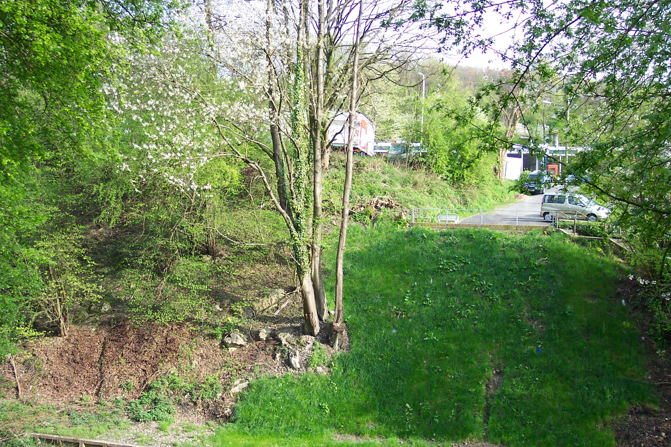 Der Eulenkopfweg, Wuppertal